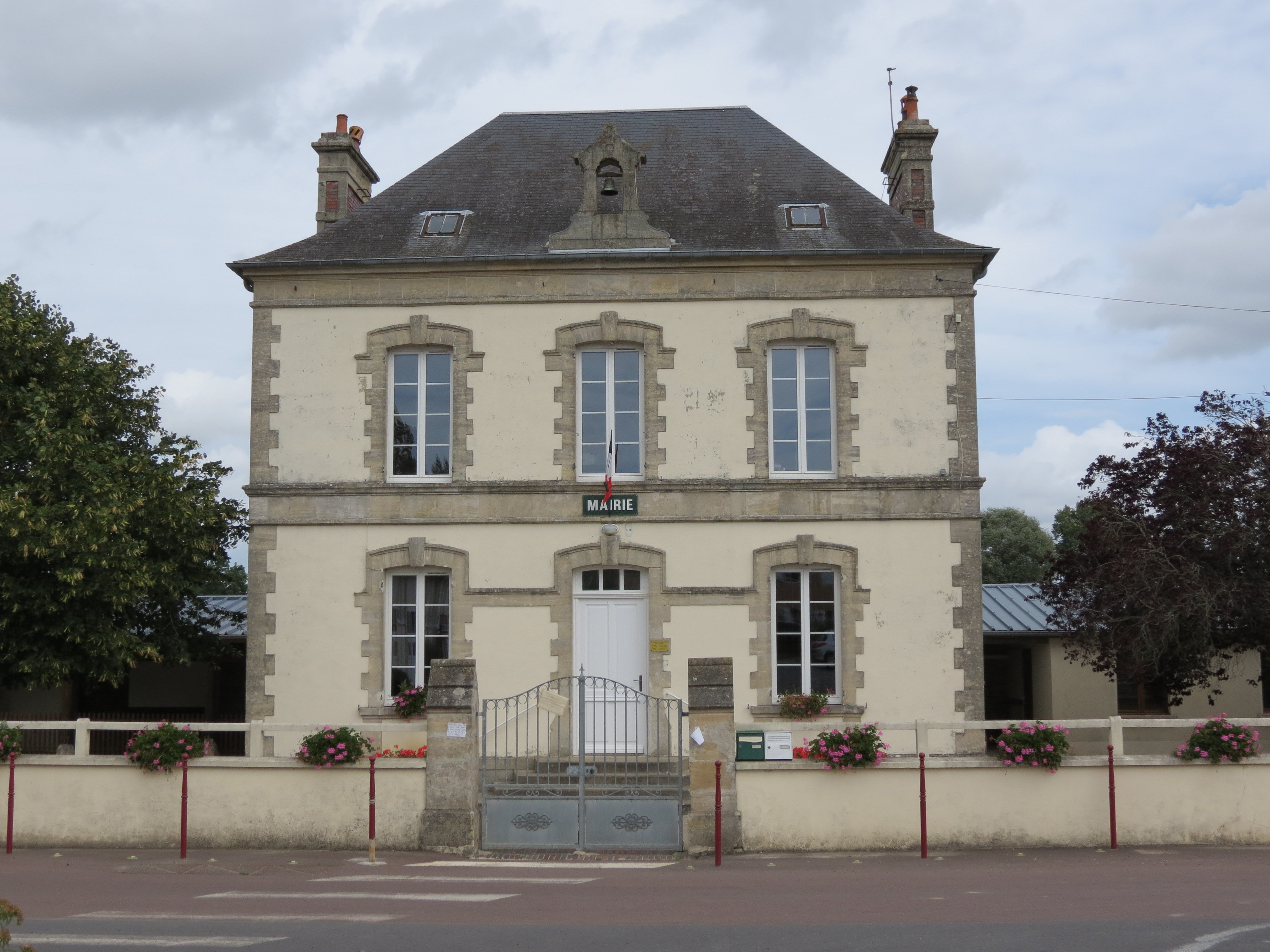 Mairie du Tronquay